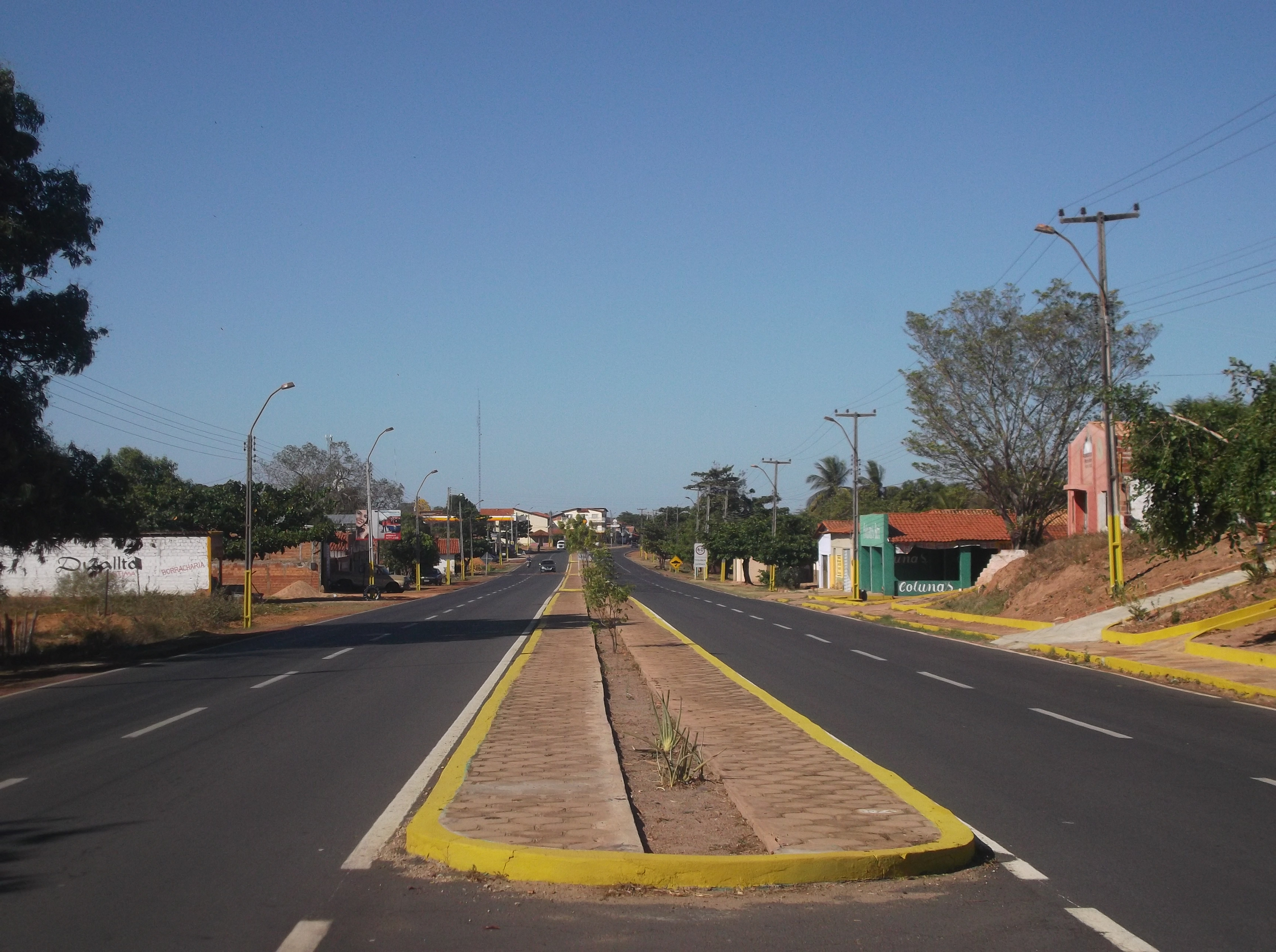 Treco da BR-343 em Capitão de Campos, no Piauí.